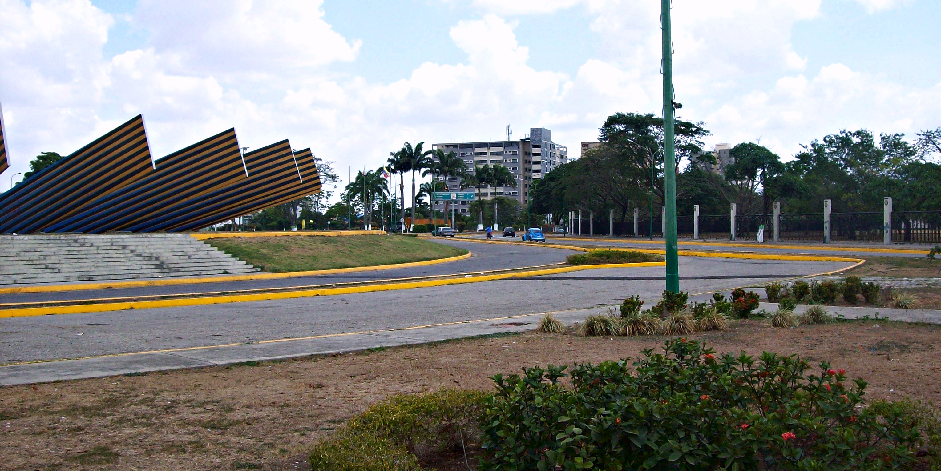 Redoma del Sol Naciente al inicio de la Avenida Libertador de la ciudad de Barquisimeto, a la derecha se nota el enrejado del Parque del Este.